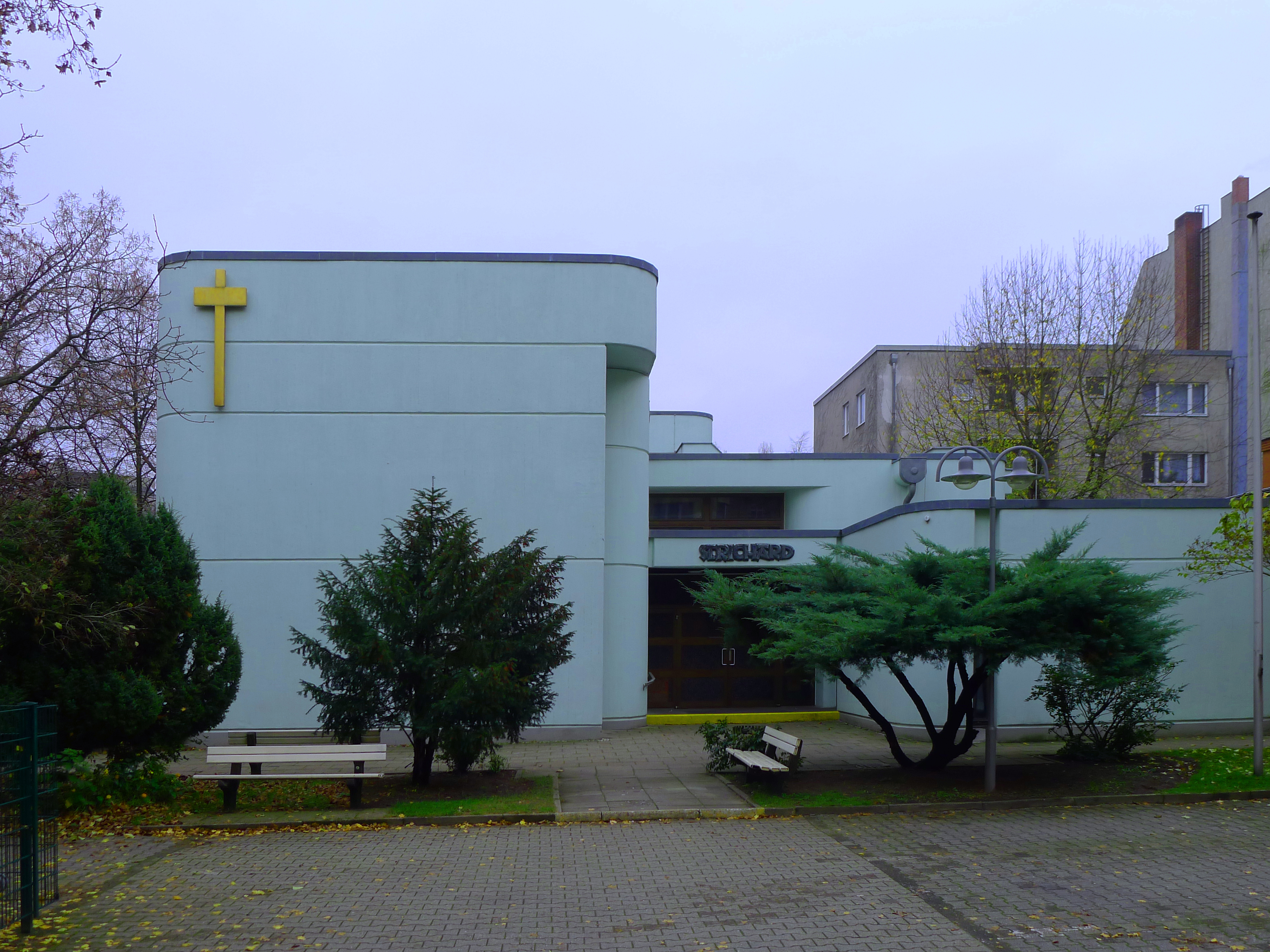 Haupteingang zur Kirche